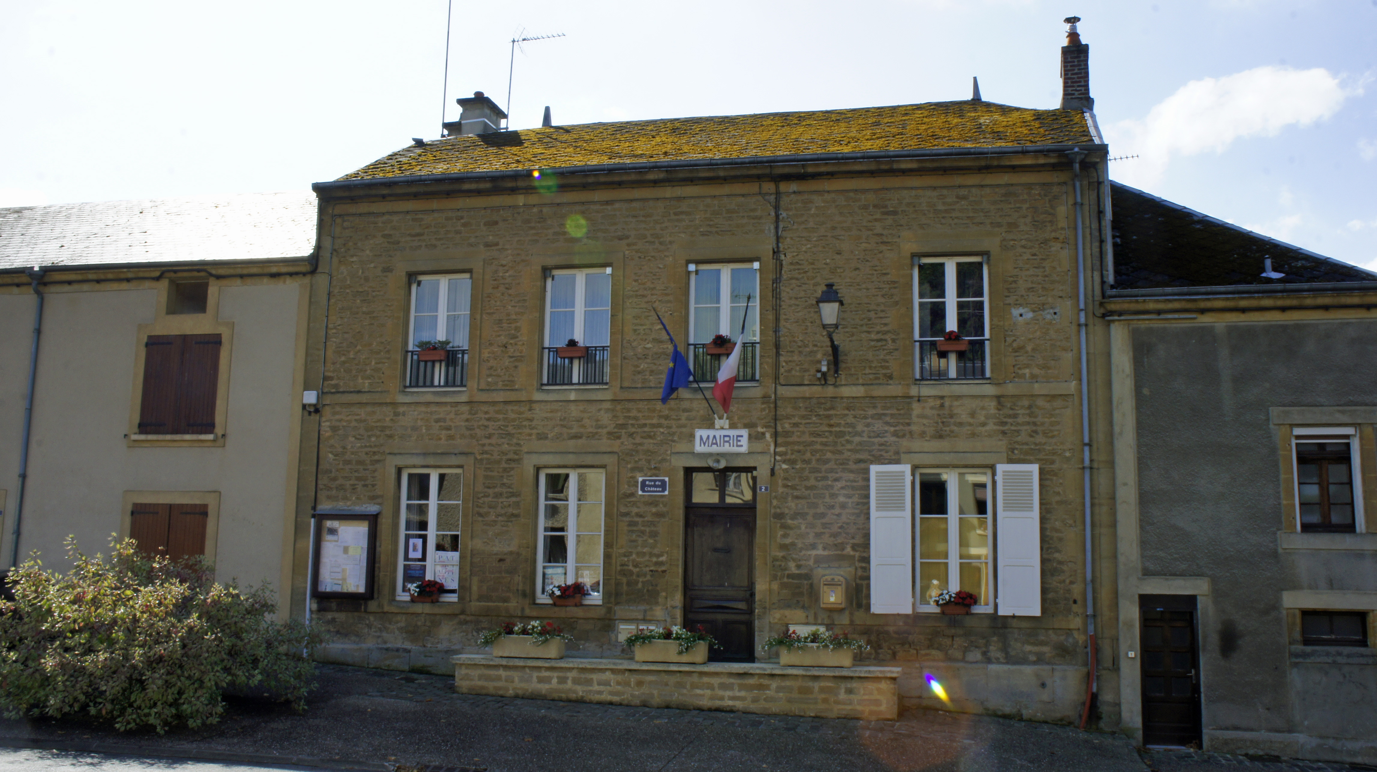 La Mairie de la Moncelle.